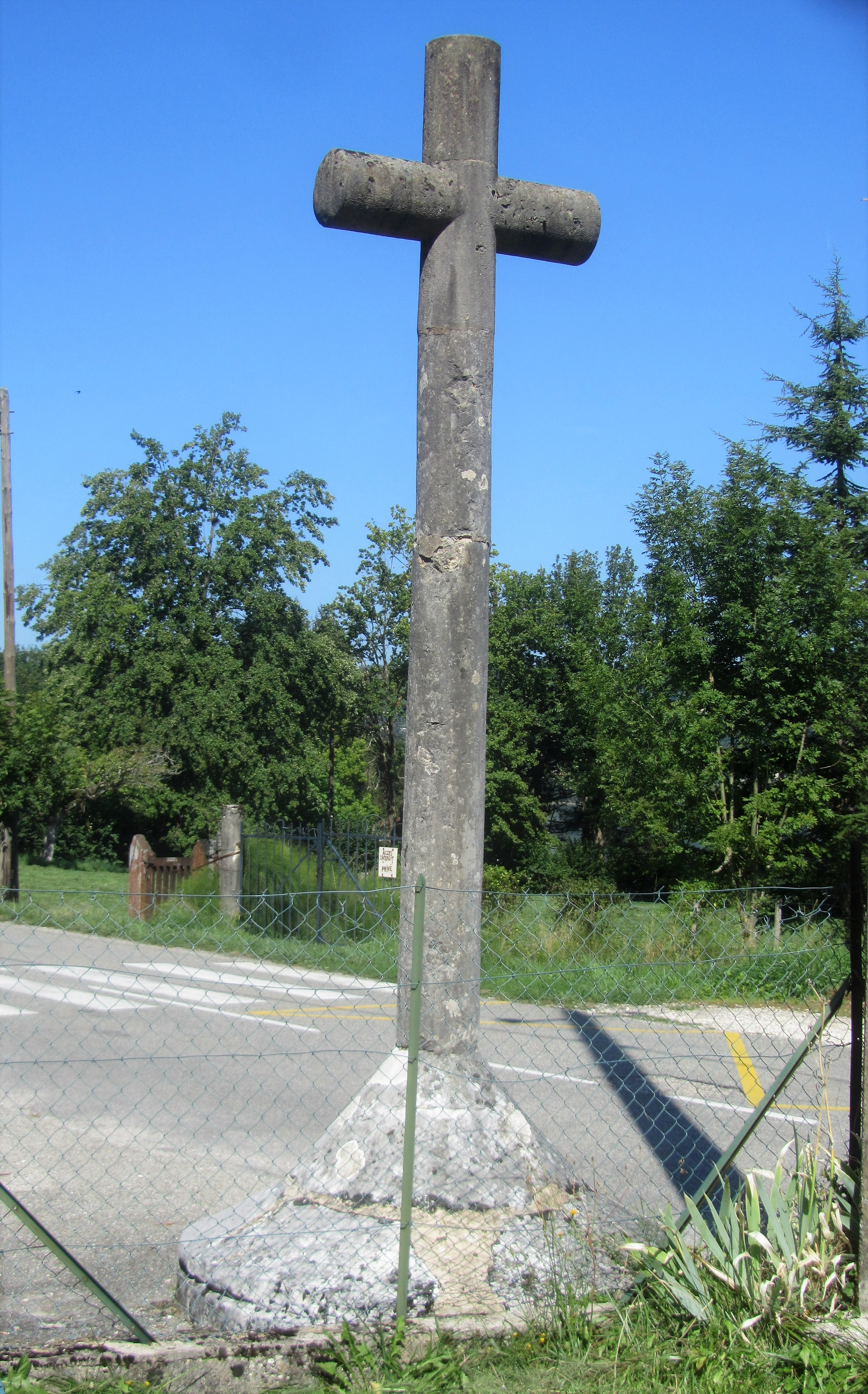 Cette croix a pris la place d'une borne miliaire romaine